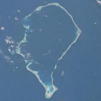 Eiland Funafuti (Tuvalu) vanuit spaceshuttle. Foto: NASA Atlantis STS104 (juli 2001), 200 km hoogte